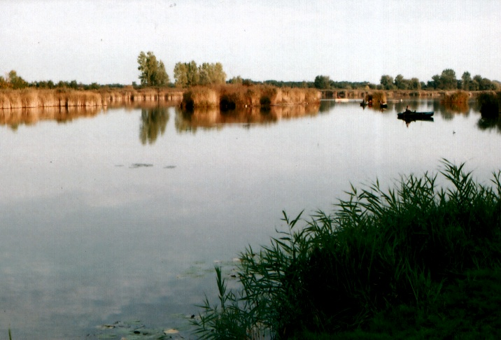 Vajai tó